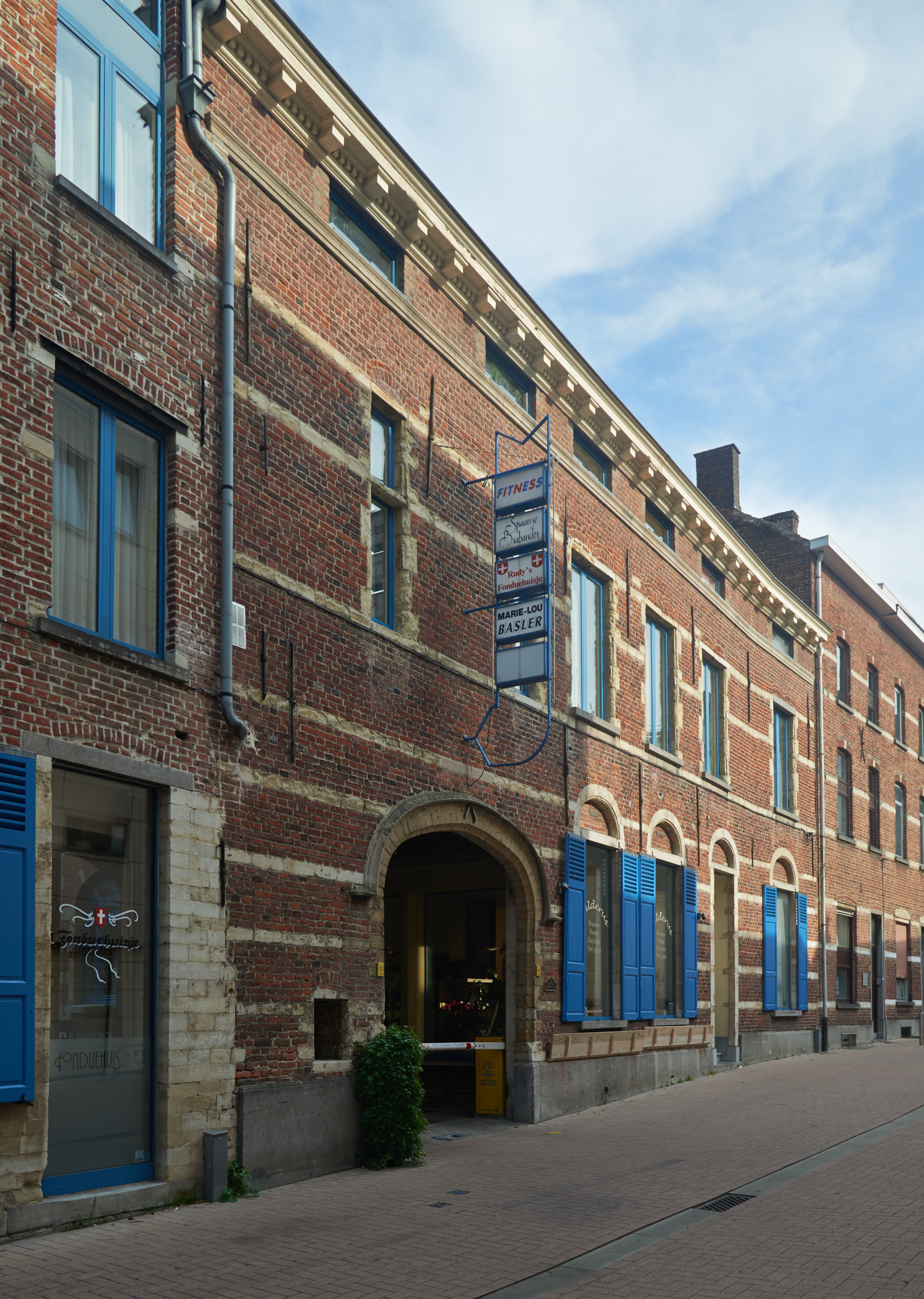 Leuven, Sint-Maartenstraat 12 (links) en 10